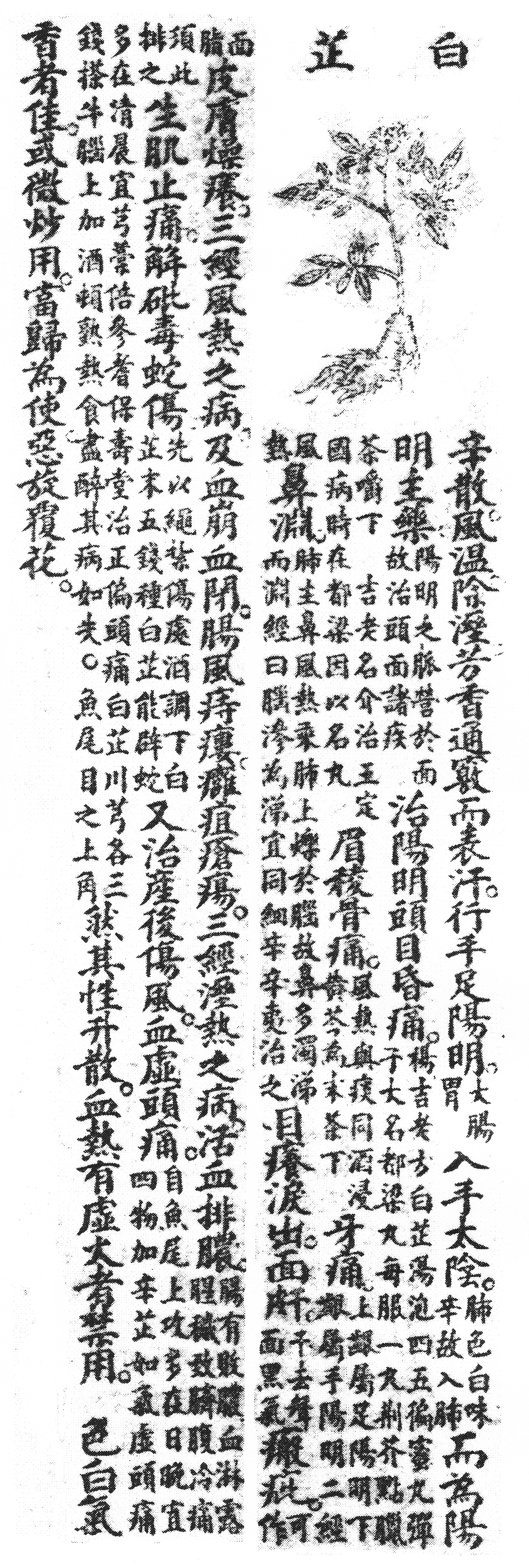 Abbildung unte Text zur Angelica dahurica in einem illustrierten Kompendium der Materia medica